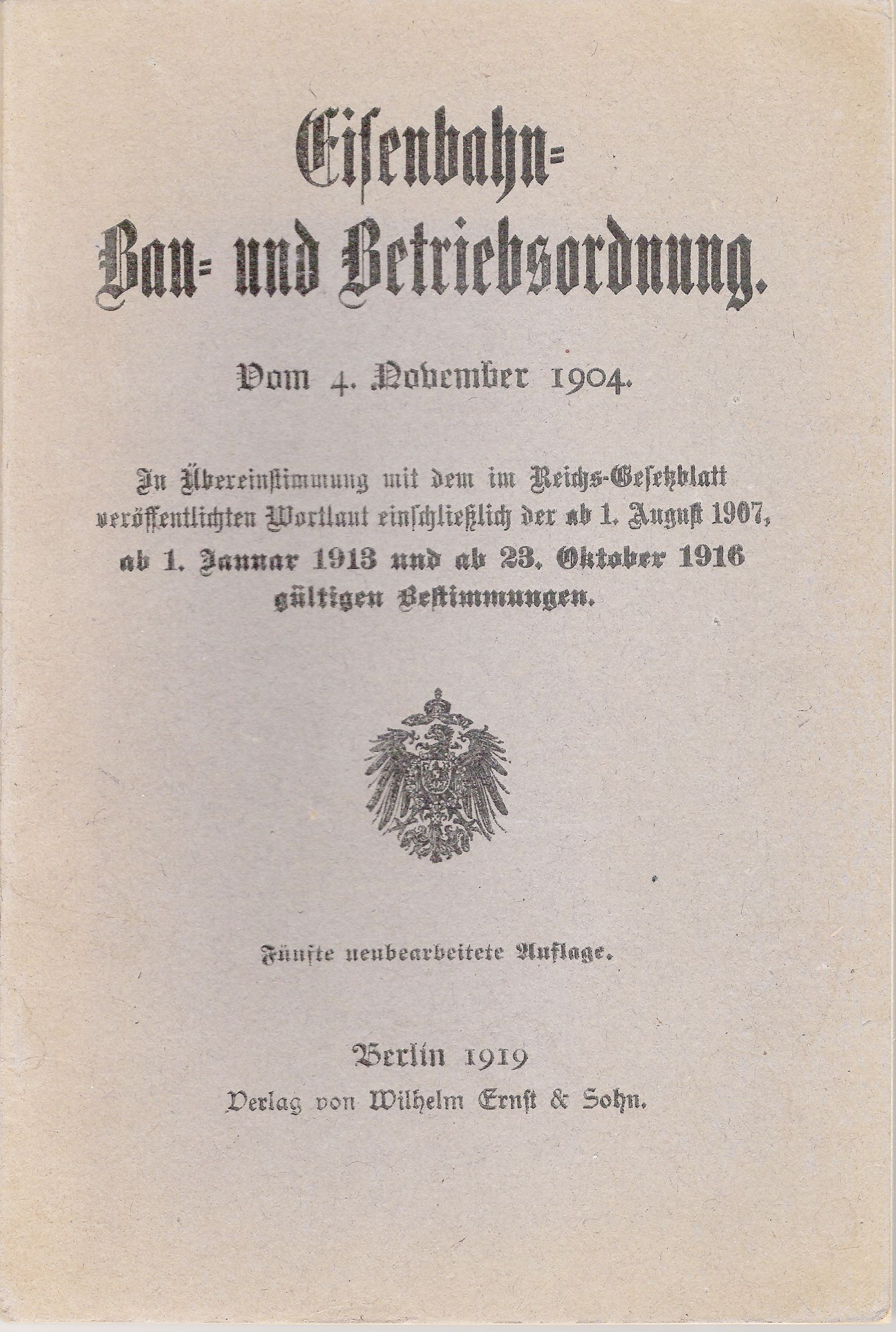 EBO von 1904